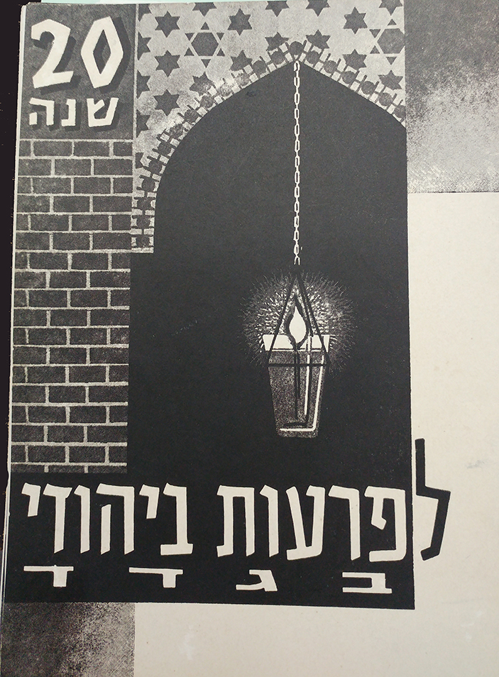 1961 - החוברת 20 שנה לפרעות ביהודי בגדד